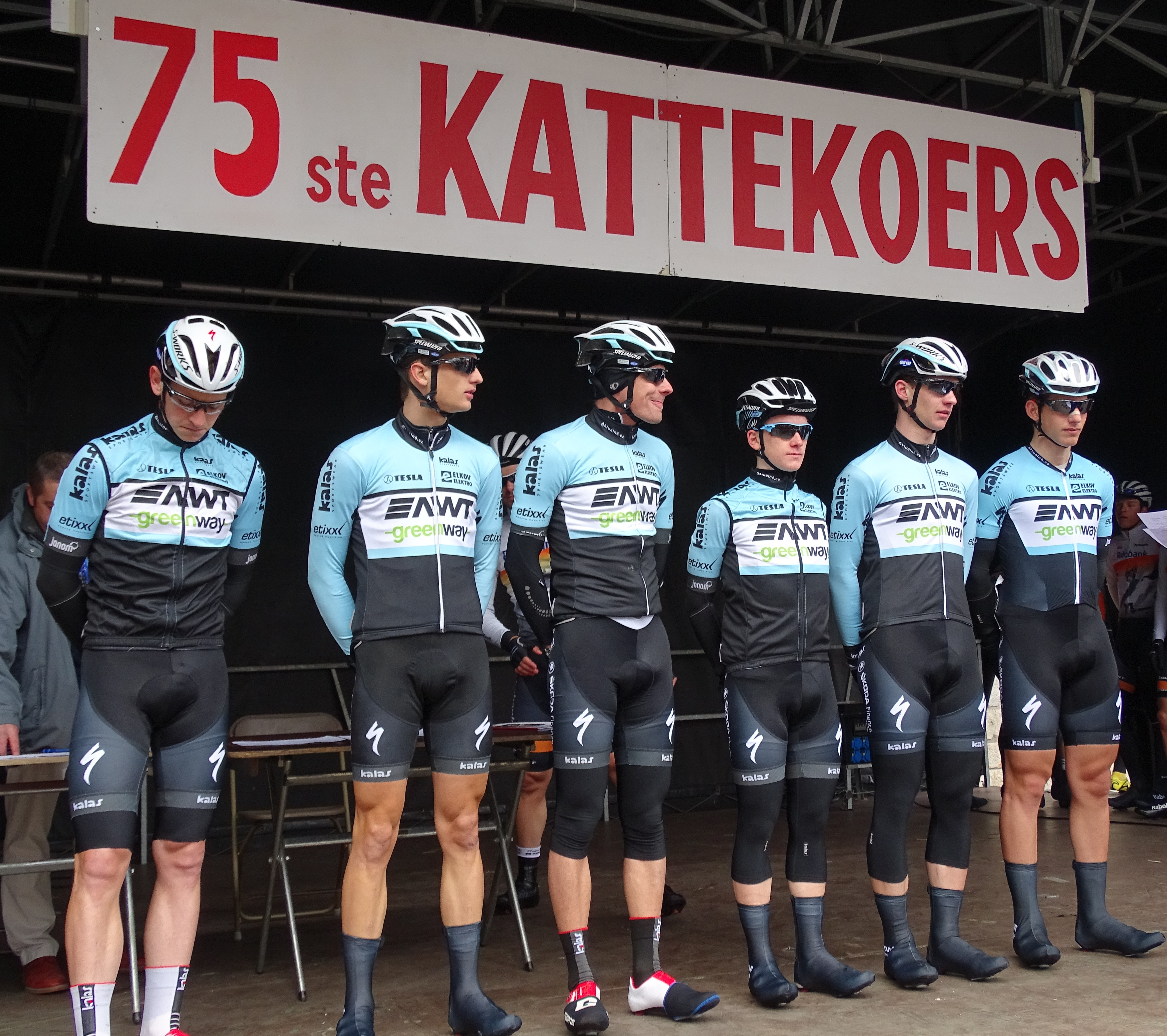 Reportage réalisé le dimanche 15 mars à l'occasion du départ et de l'arrivée de la Course des chats 2015 à Ypres, Belgique.